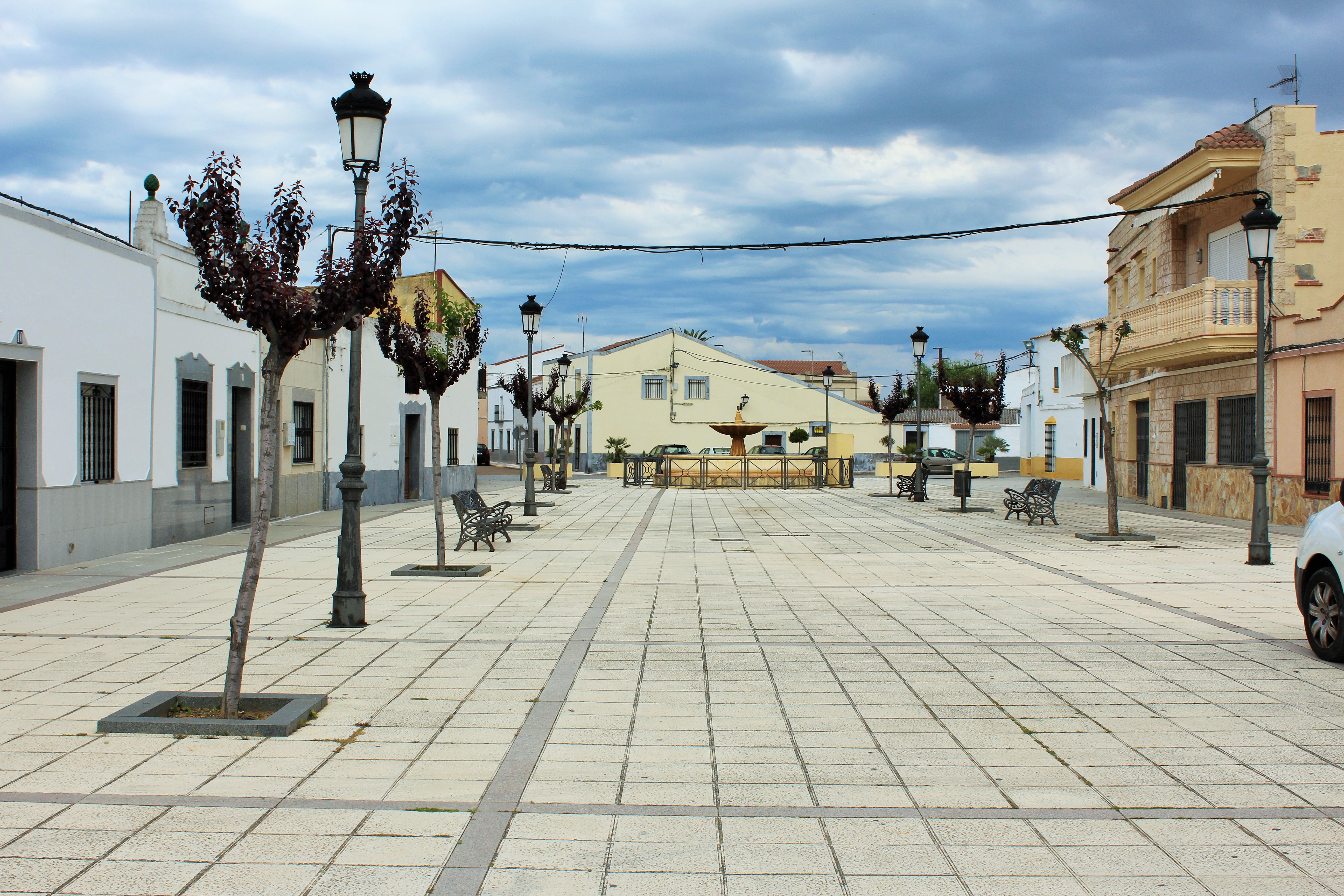 Plaza